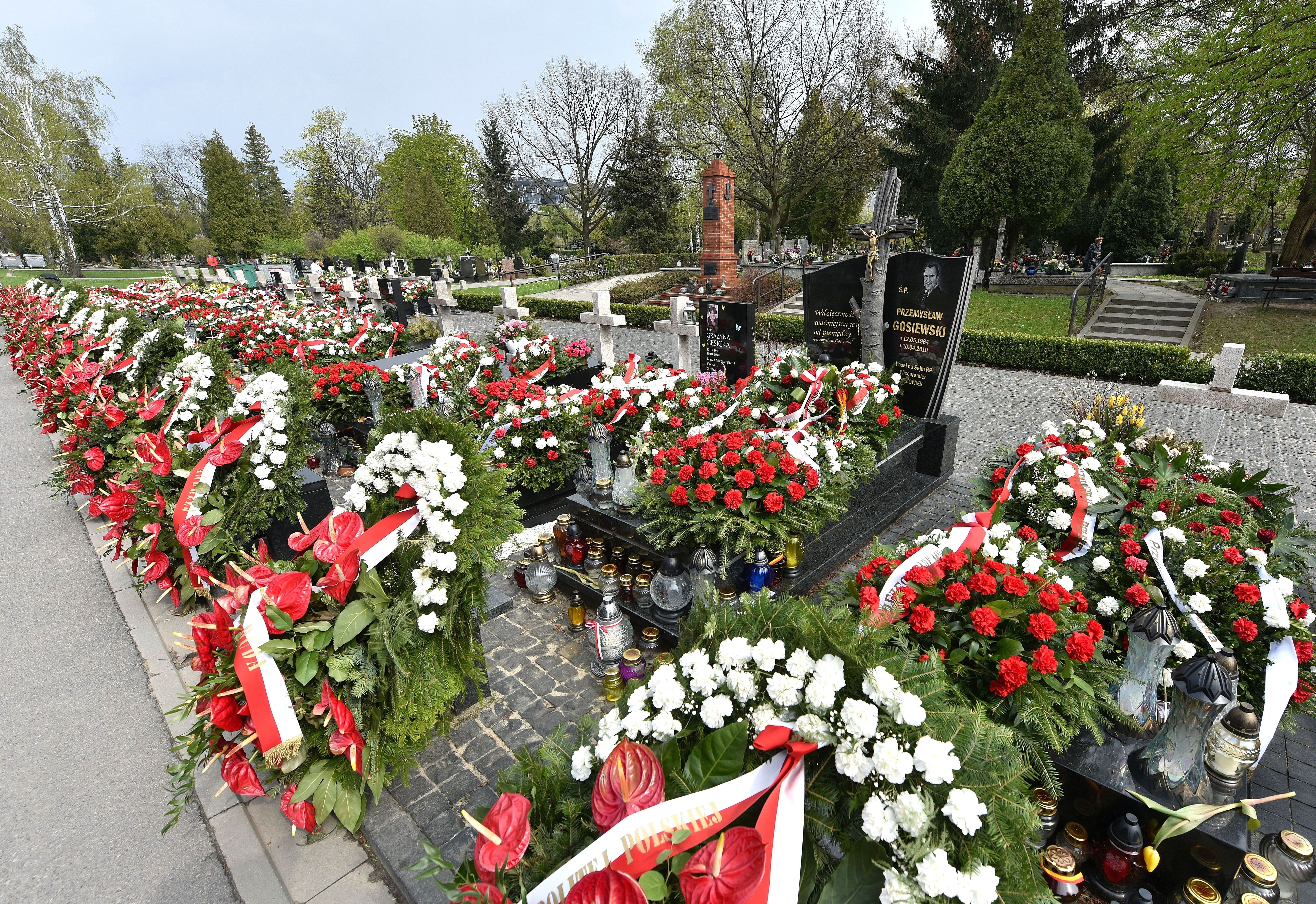 Groby ofiar katastrofy smoleńskiej na Powązkach Wojskowych w Warszawie